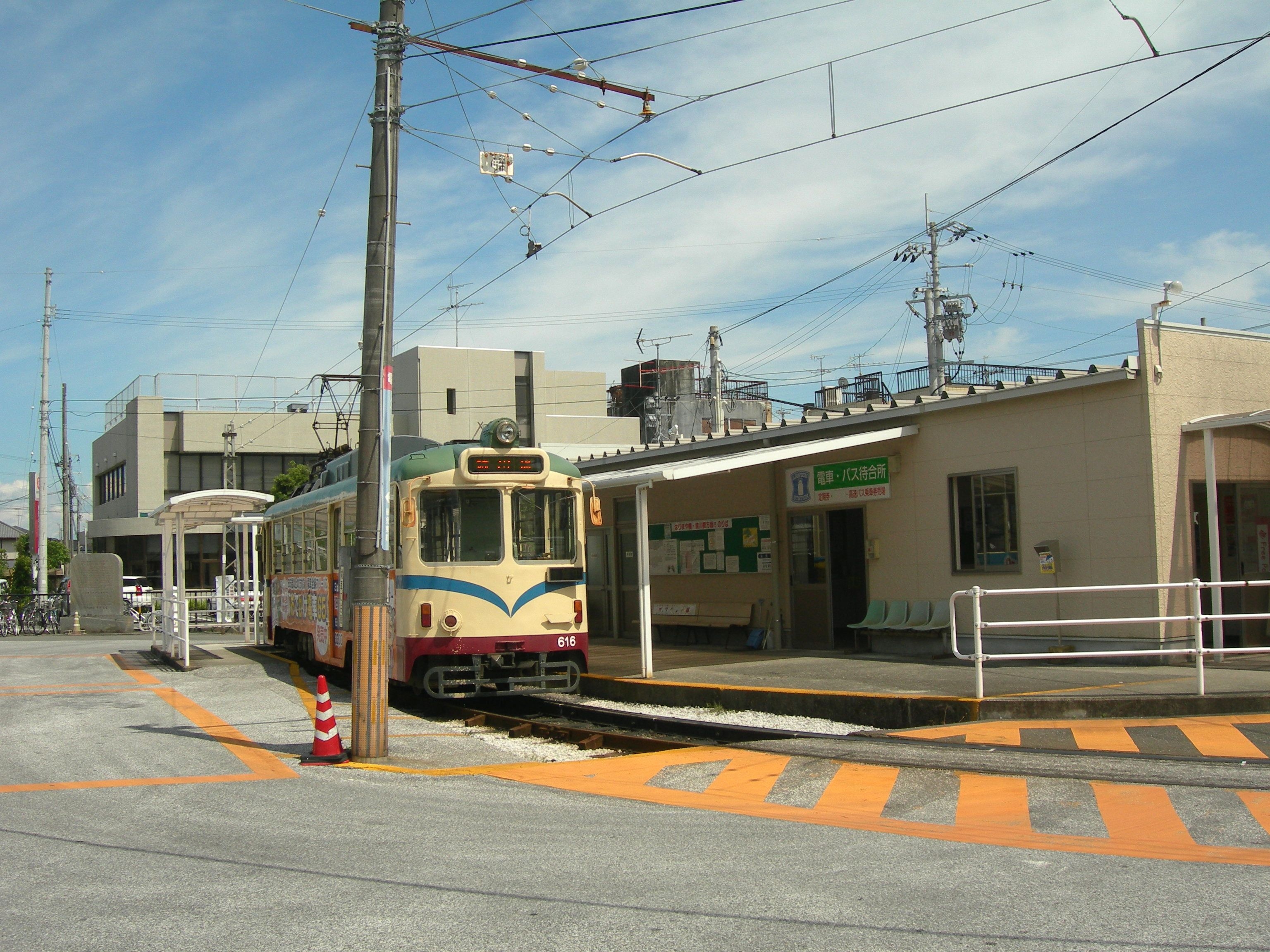 ごめん町 電停